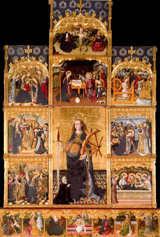 Retablo de Santa Catalina mártir, hacia 1450, temple sobre tabla, iglesia parroquial de Nuestra Señora, Villahermosa del Río.